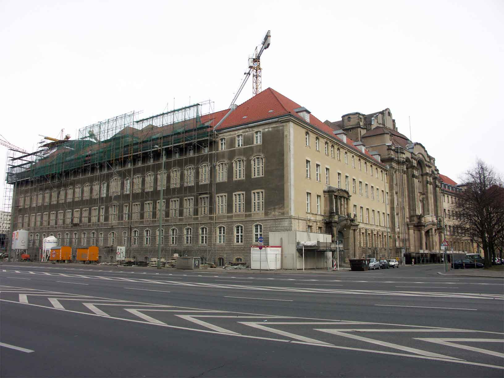 Diese Abbildung zeigt nicht das ehemalige Oberste Gericht der DDR in der Scharnhorststraße, sondern das Gerichtsgebäude in der Littenstraße 12-17 in 10179 Berlin Mitte; jetziges Landgericht Berlin 2; Das Oberste Gericht der DDR hatte seinen Eingang an der westlichen - von Bäumen rechts verdeckten - Seite der Gebäudefront zur Littenstraße. Der mittig liegende Haupteingang führt in den Lichthof des früheren und heutigen Amtsgerichts Mitte. In der DDR-Zeit befand sich hier der Zugang zum Stadtgericht Berlin und zu den Stadtbezirksgerichten Mitte, Prenzlauer Berg und zeitweilig Friedrichshain. Im vorderen Teil des Bildes - Ostseite des Gebäudes - ist der Eingang zu den Dienststellen des Generalstaatsanwaltes von Berlin, der Stadtbezirksstaatsanwälte Mitte, Prenzlauer Berg und zeitweilig auch Friedrichshain zu sehen. An der Rückseite des Gebäudes befand sich der Eingang zur Dienststelle Militäoberstaatsanwalt. Bei dem östlichen Teil des Gebäudes handelt es sich um den Rest des früheren Landgerichts, von dem Ende der 60er Jahre zwei Flure und der Lichthof abgerissen wurde, um die Verbreiterung der Grunerstraße zu ermöglichen.